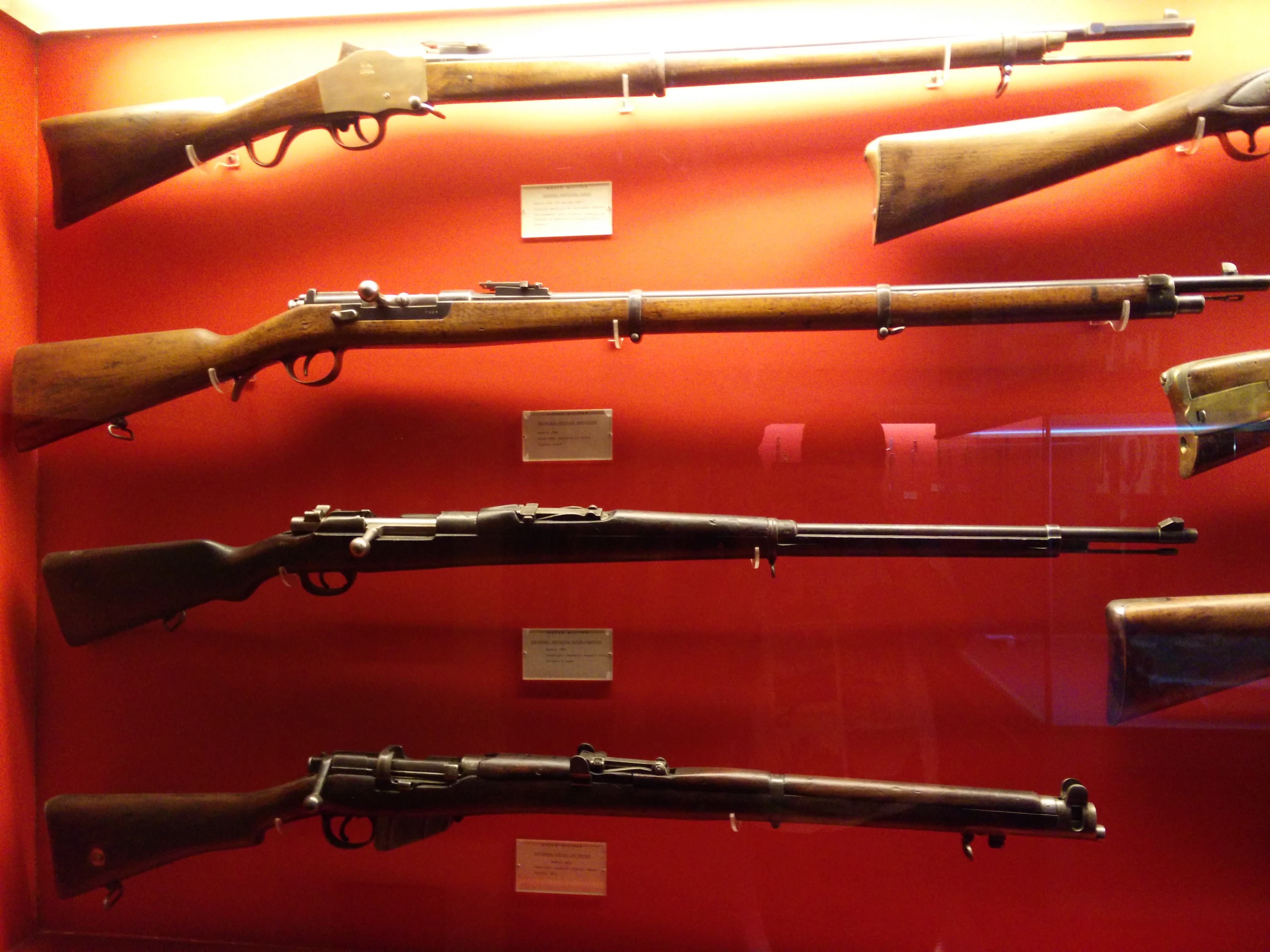 Razne puške portugalske vojske